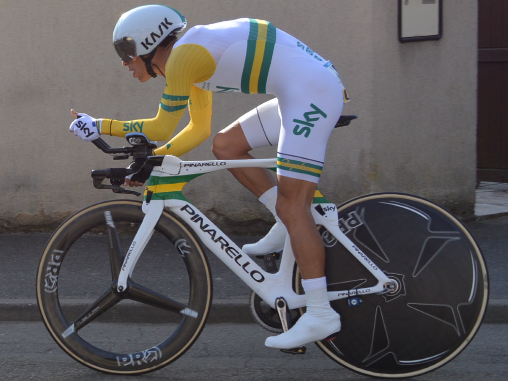 Richie Porte à Paris-Nice 2015